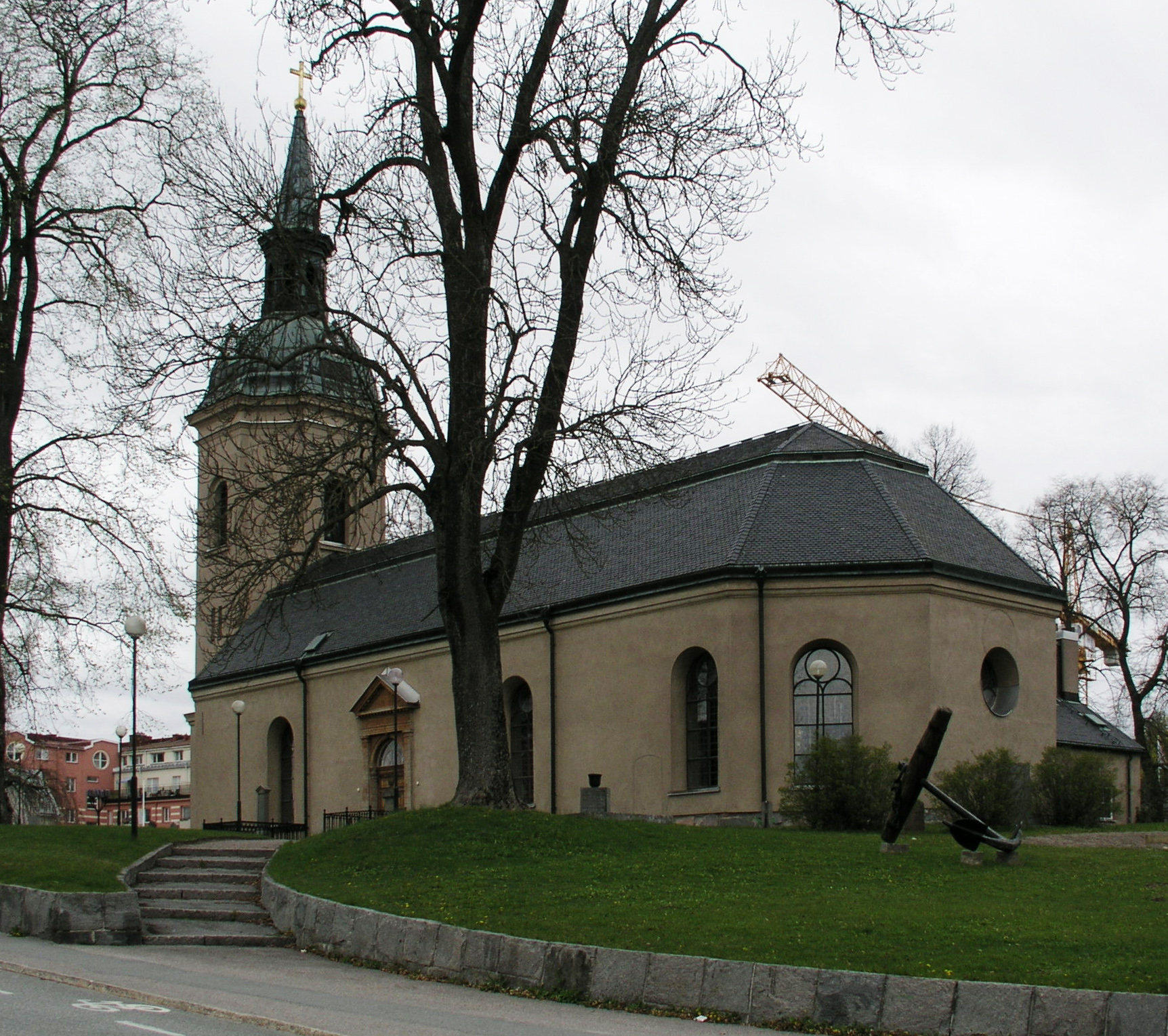 Norrtälje kyrka, Diocese of Uppsala, Norrtälje kommun